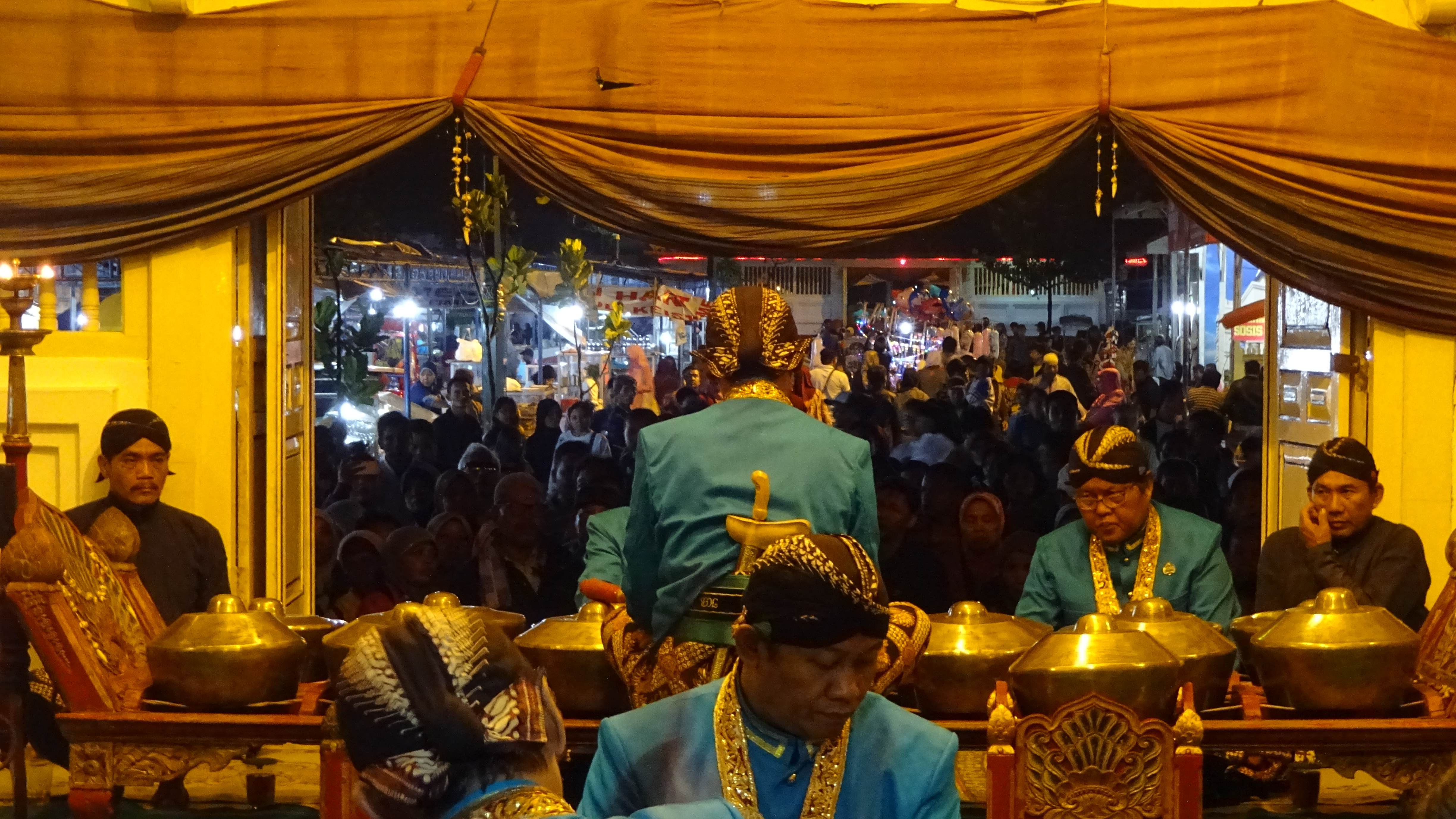 Gamelan sekaten biasa ditabuh setiap hari selama sepekan dalam perayaan sekaten di Keraton Yogyakarta. Masyarakat sangat antusias mendengarkan alunan tetabuhan dari gamelan pusaka tersebut.